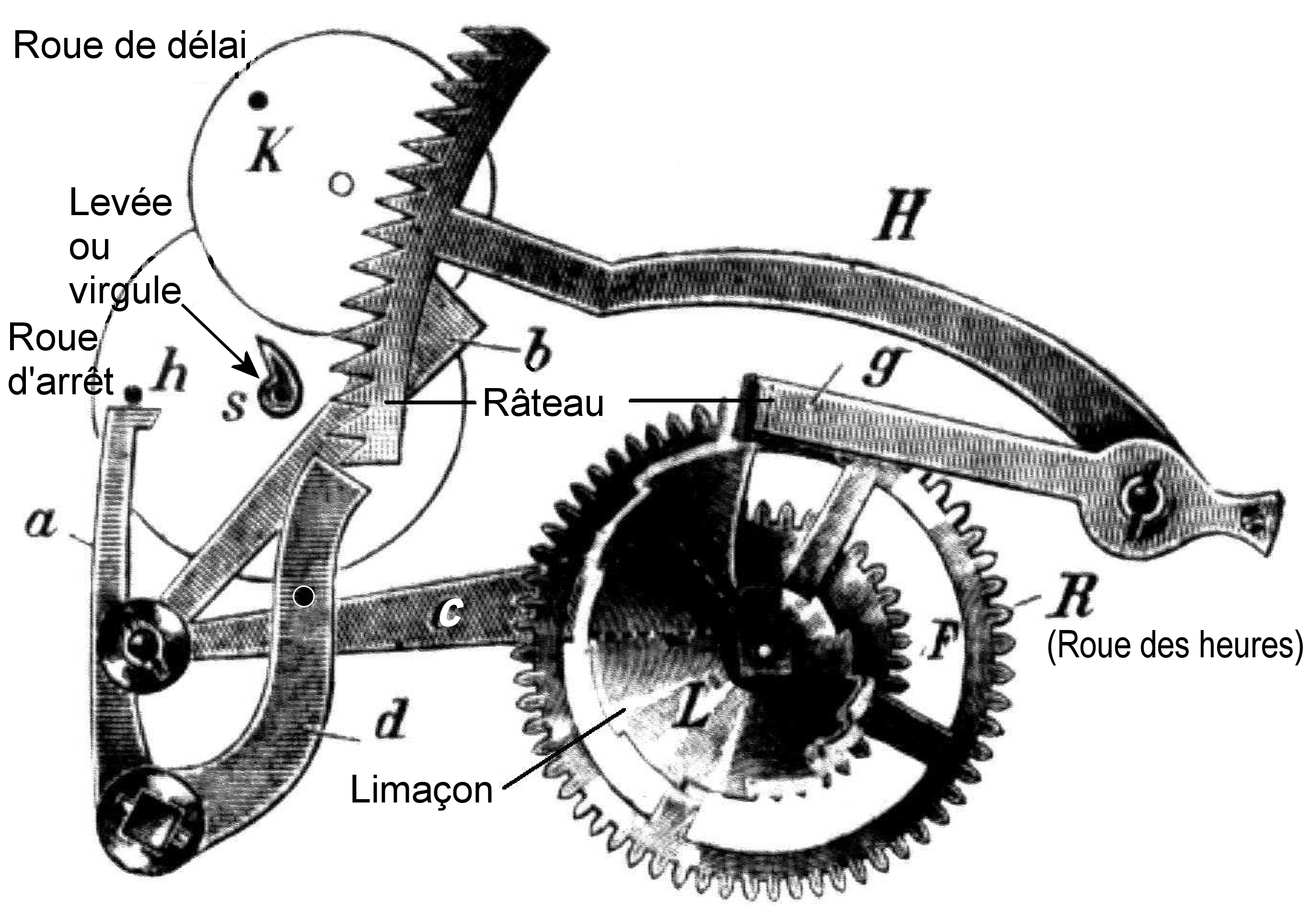 Mécanisme partiel d'une sonnerie à râteau.